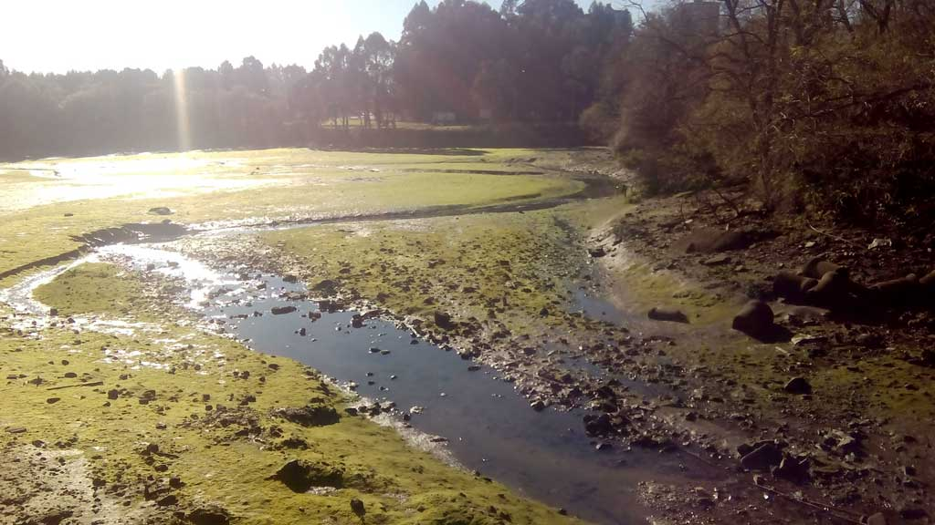 O río Inxerto na ensenada da Gándara.